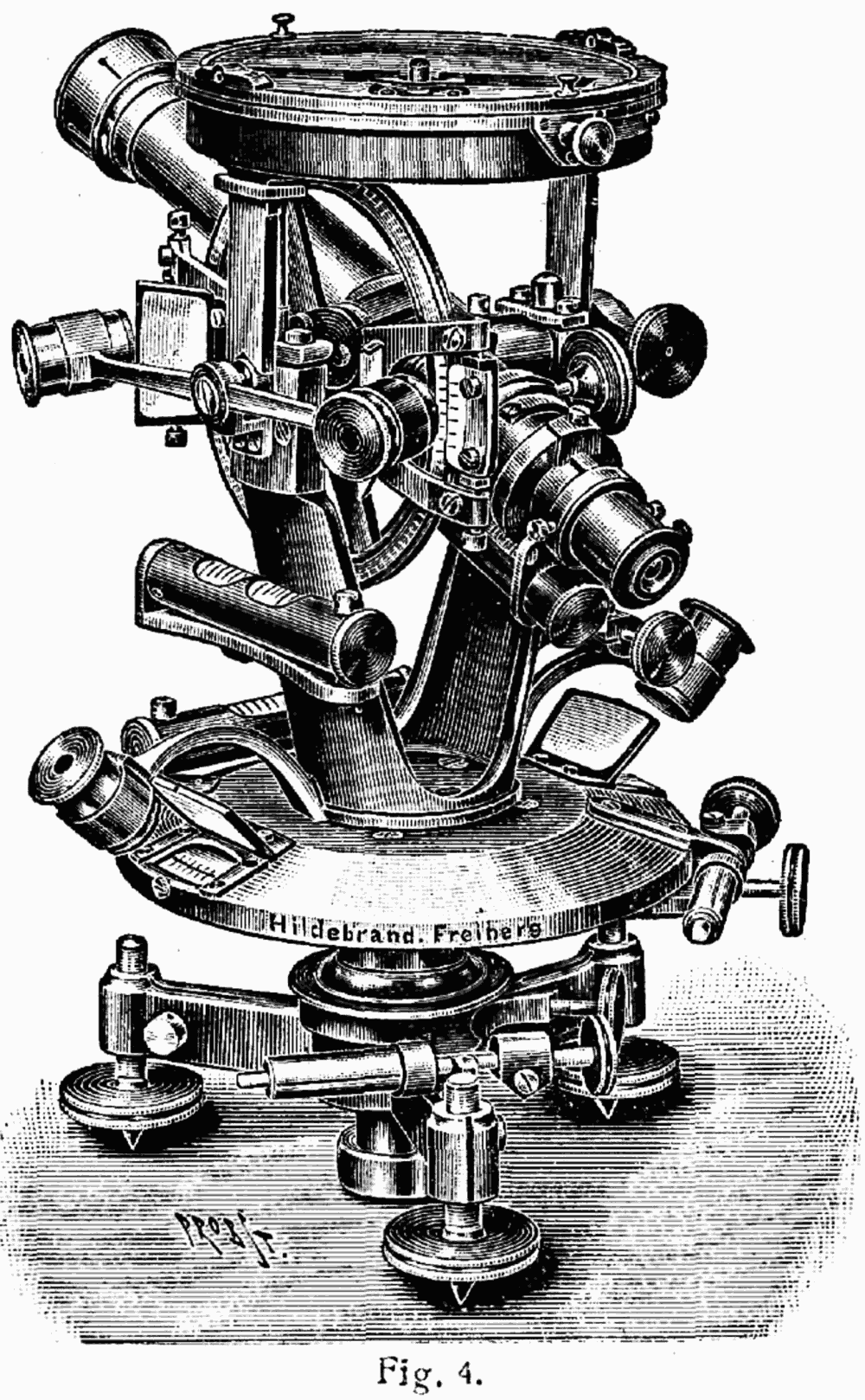 Theodolittachymeter mit Aufsatzbussole von Hildebrand.